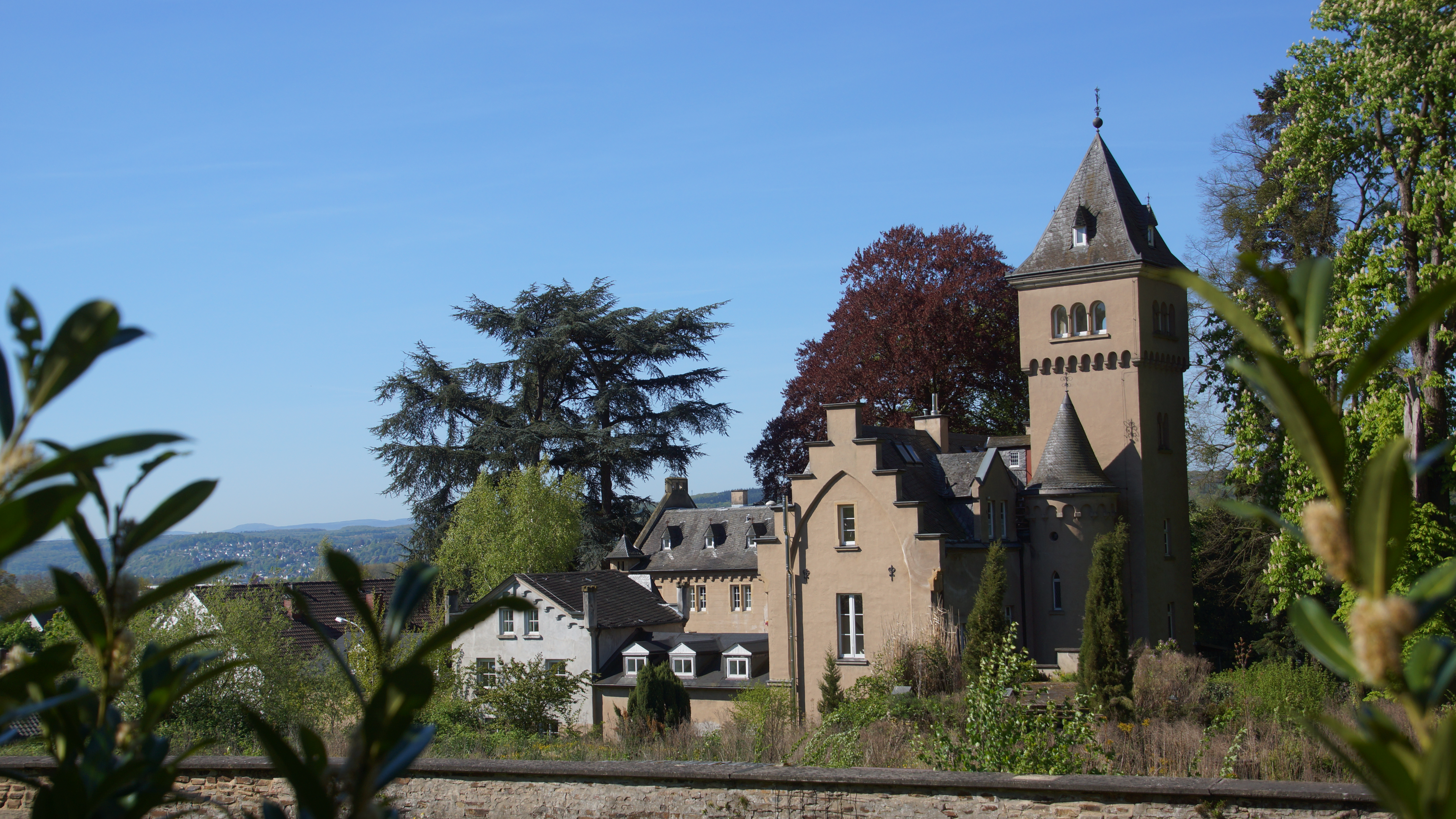 Villa Schaaffhausen in Rommersdorf, Bad Honnef